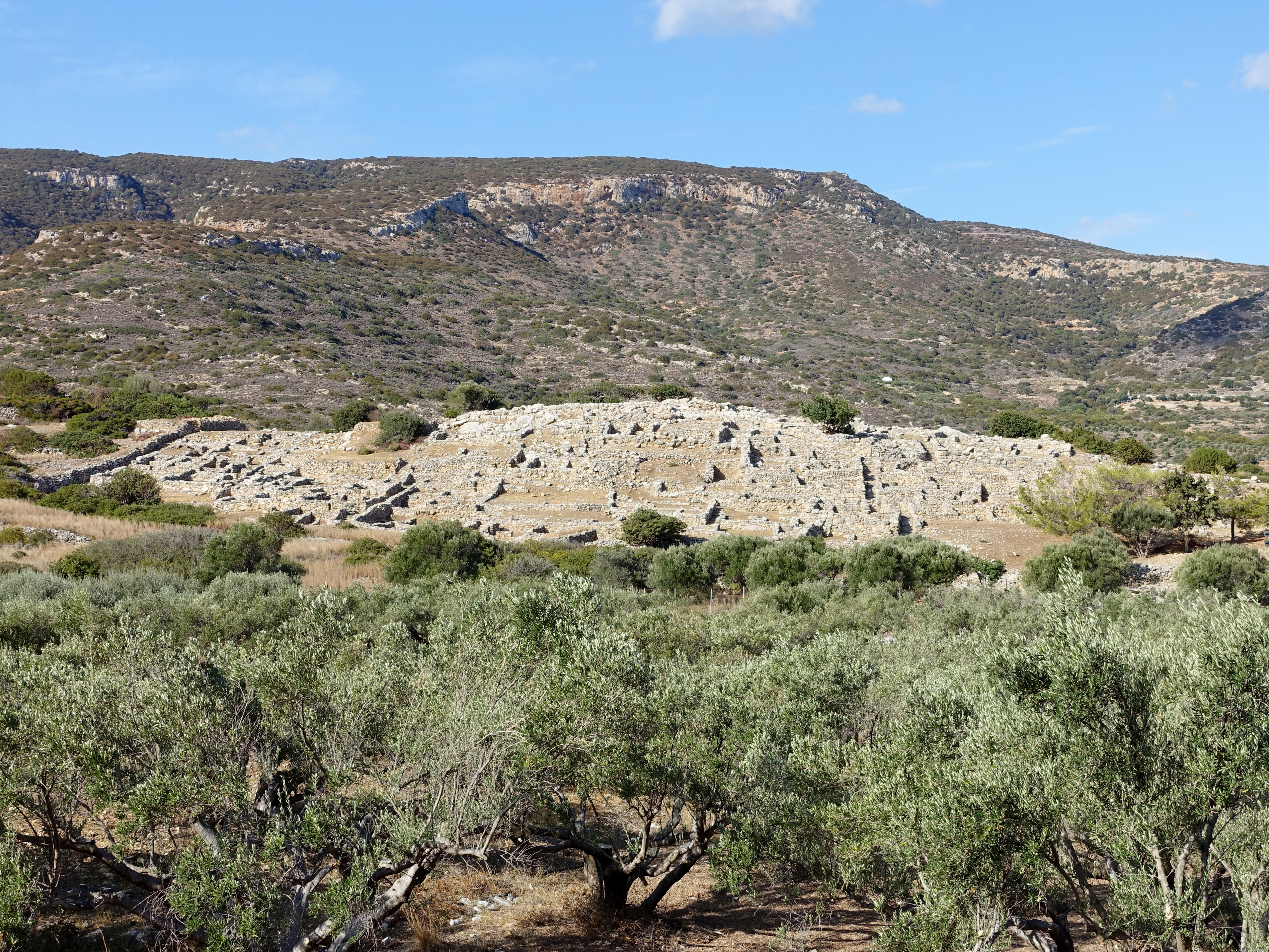 Ostansicht der minoischen Stadt von Gournia (Γουρνιά) bei Pachia Ammos (Παχειά Άμμος), Gemeinde Ierapetra, Kreta, Griechenland